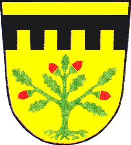 Wappen der Gemeinde Belrieth